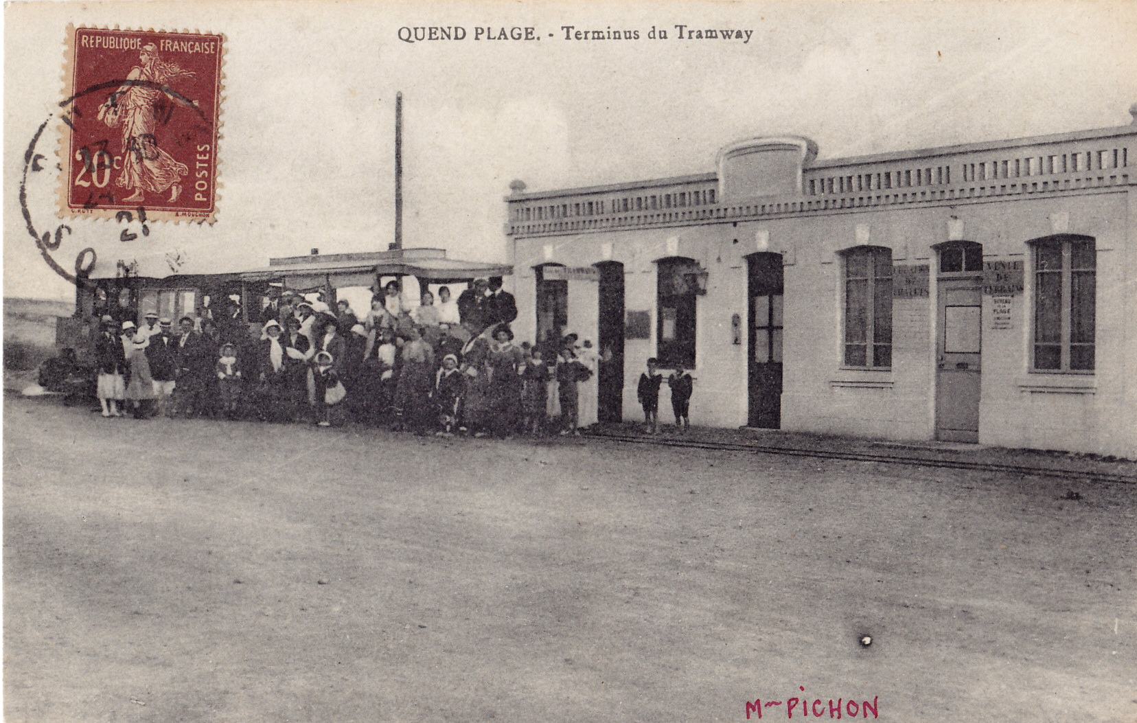 Carte postale ancienne éditée sans mention d'éditeur :QUEND-PLAGE - Terminus du Tramway